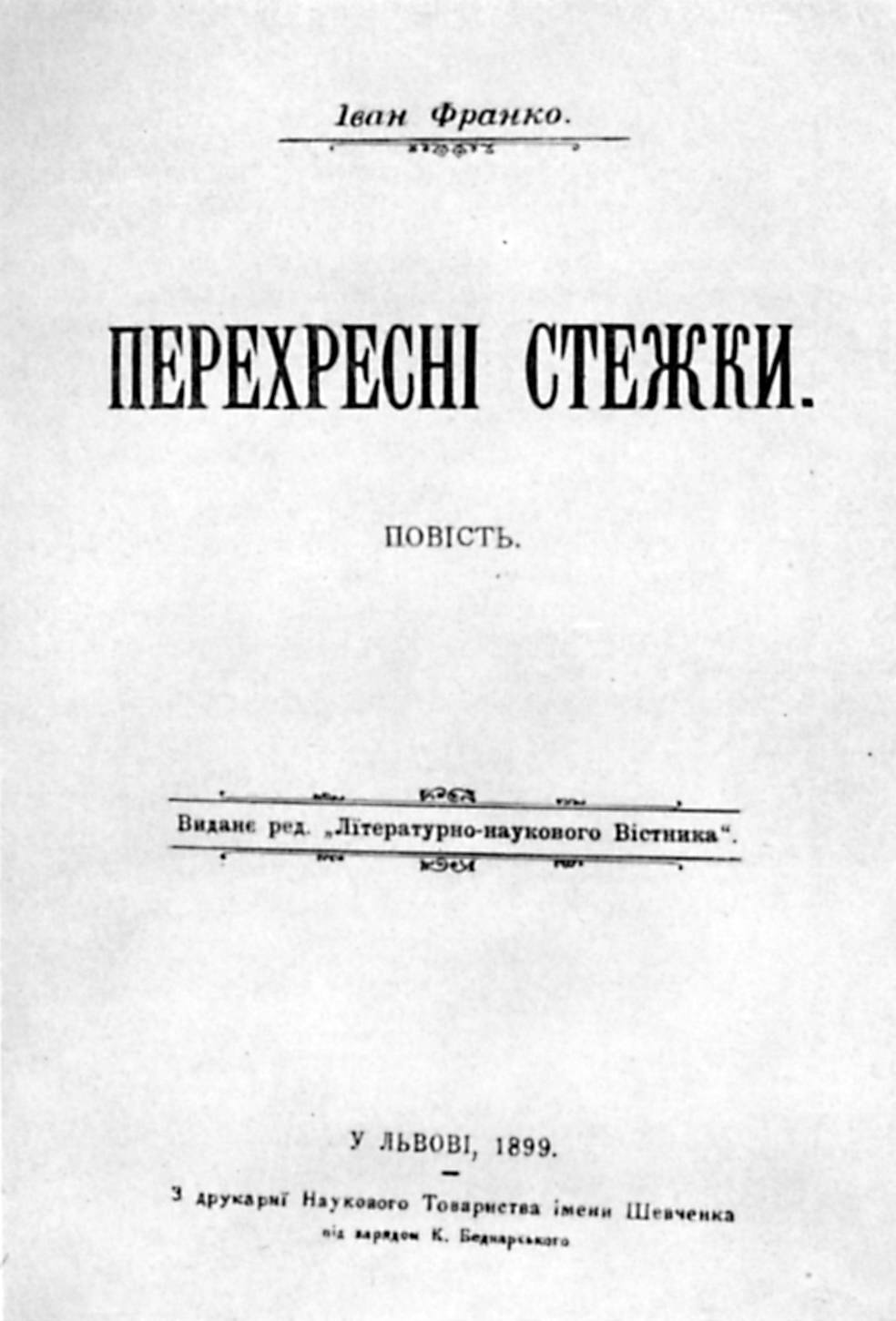 Титульна сторінка окремого видання твору І. Франка «Перехресні стежки» (Львів, 1900 р.)